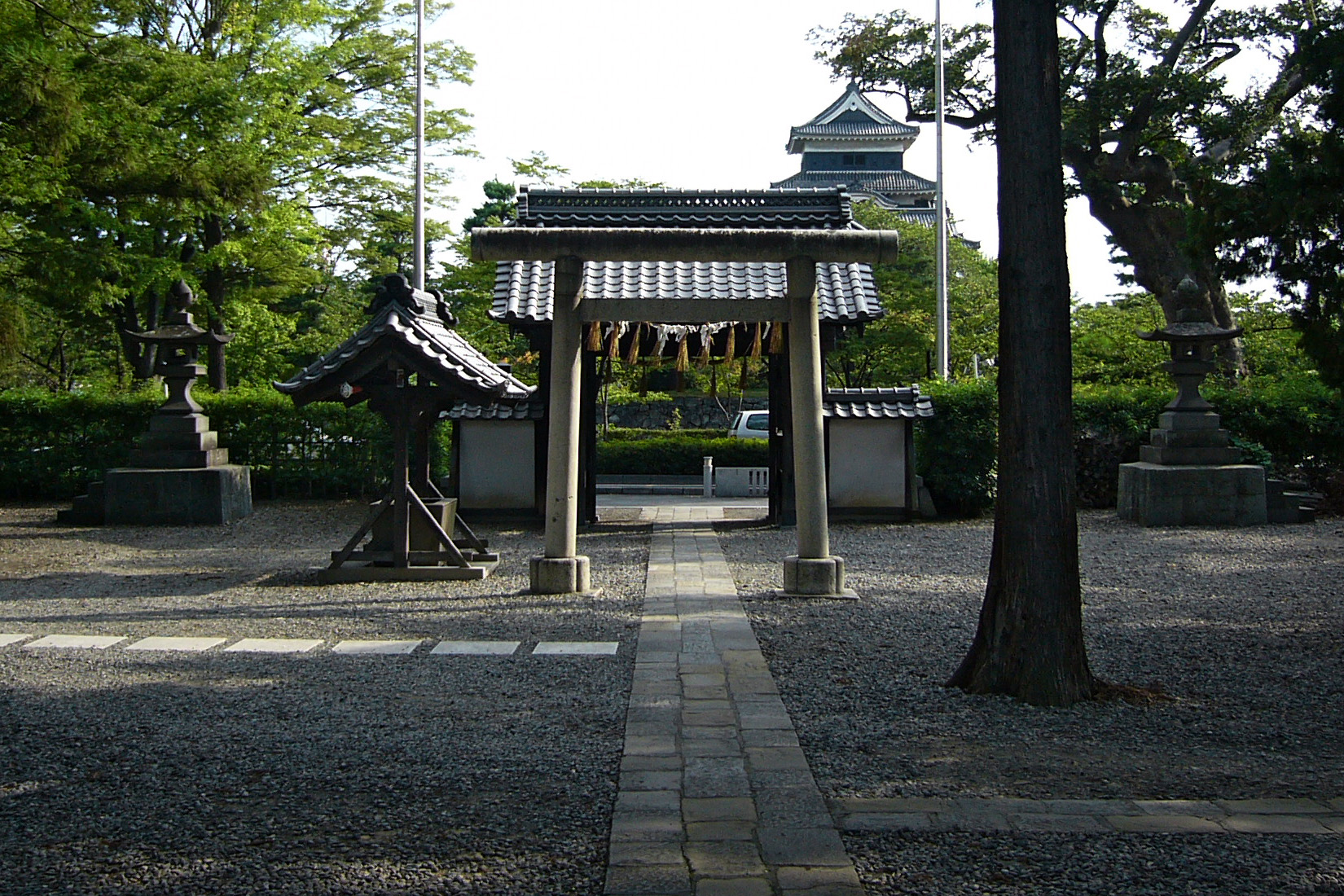 Matsumoto-jinja in Matsumoto, Nagano, Japan